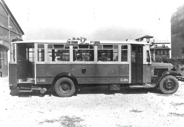 Autobus ATAC di Roma